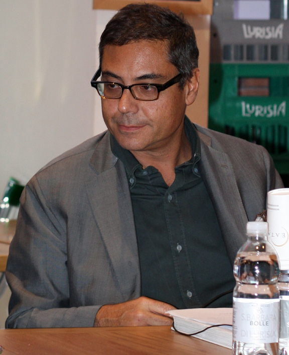 Andrea Vianello